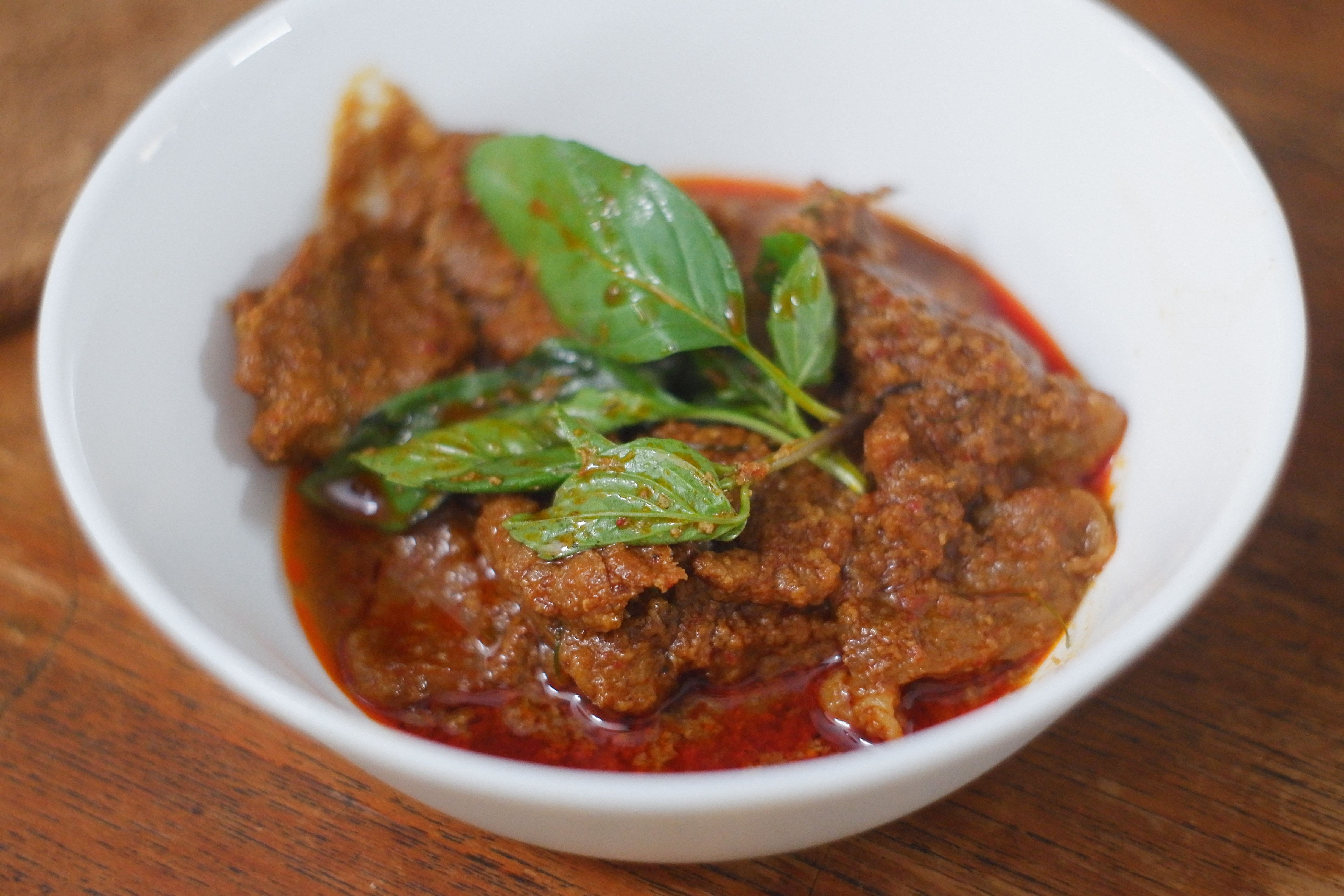 Panang curry